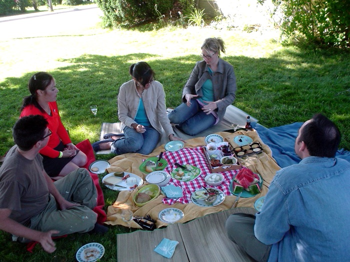 A picnic in Toronto, Canada